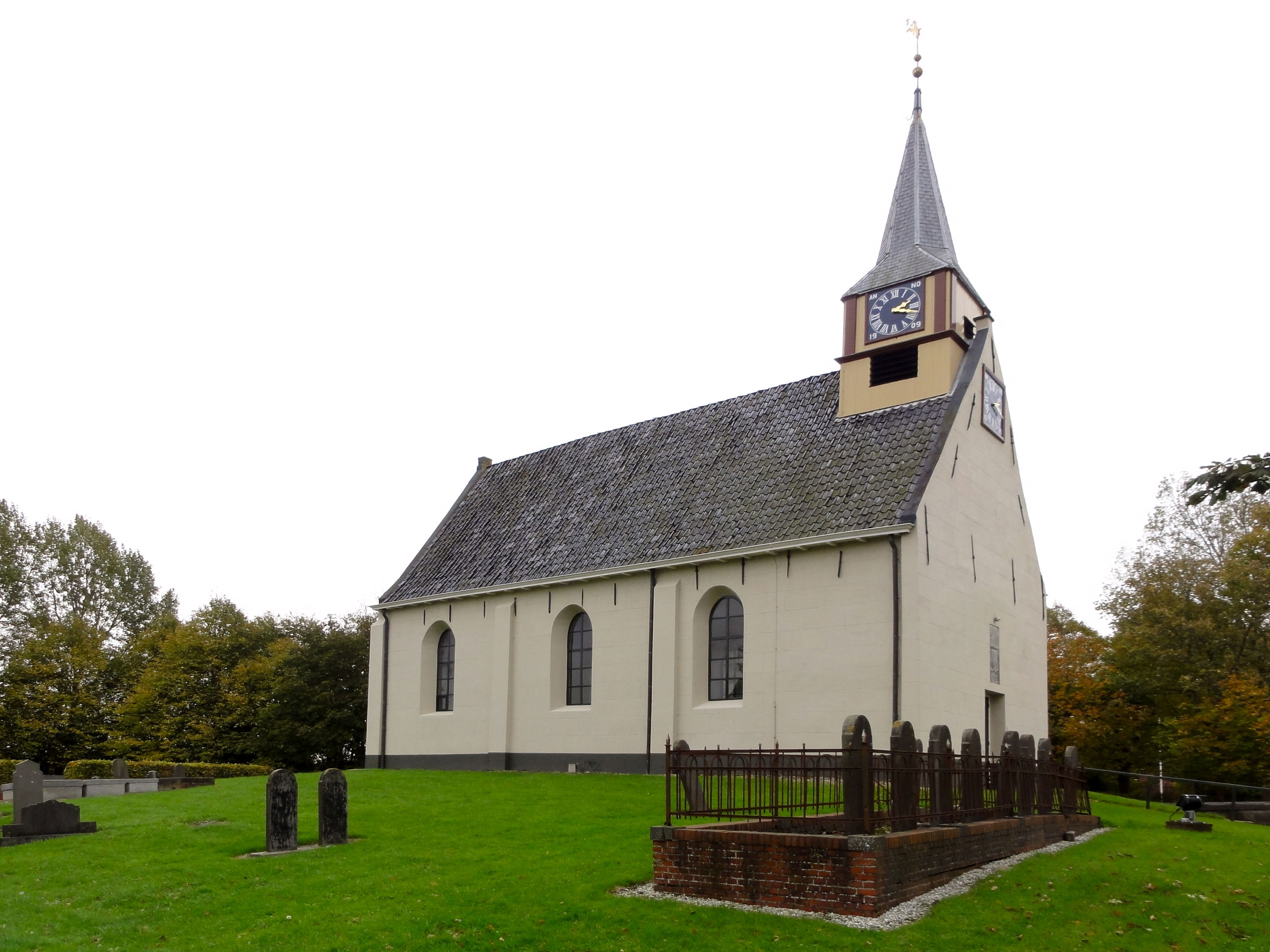 Kerk van Niekerk (de Marne)